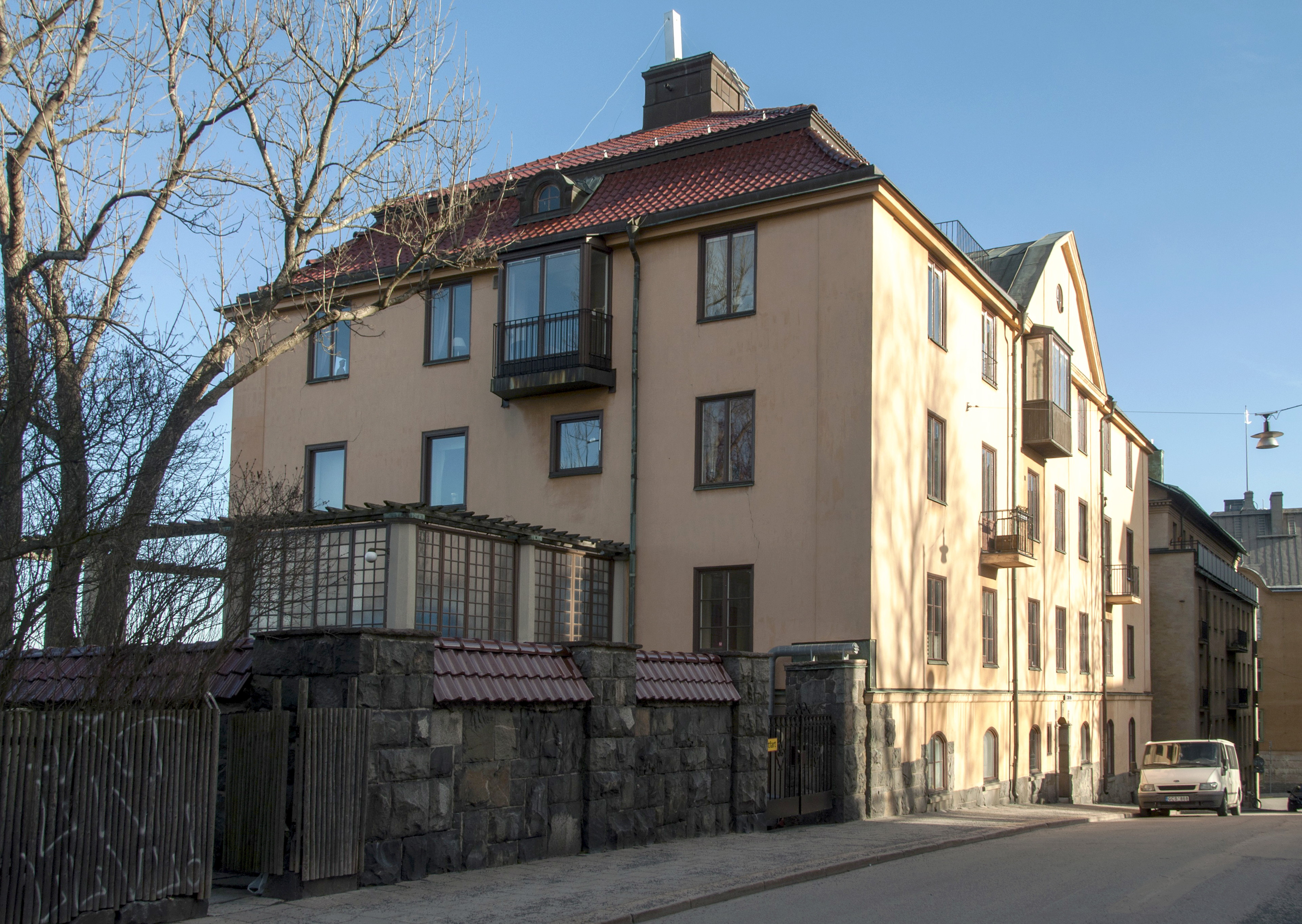 Kronan 4, Stigbergrgatan 35, Uppfört 1919-1920, arkitekter Östlihn och Stark, byggherre F Börjesson, Fast AB Stammen, byggmästare N J Iiiilason. Ombyggd 1958 och 1964.